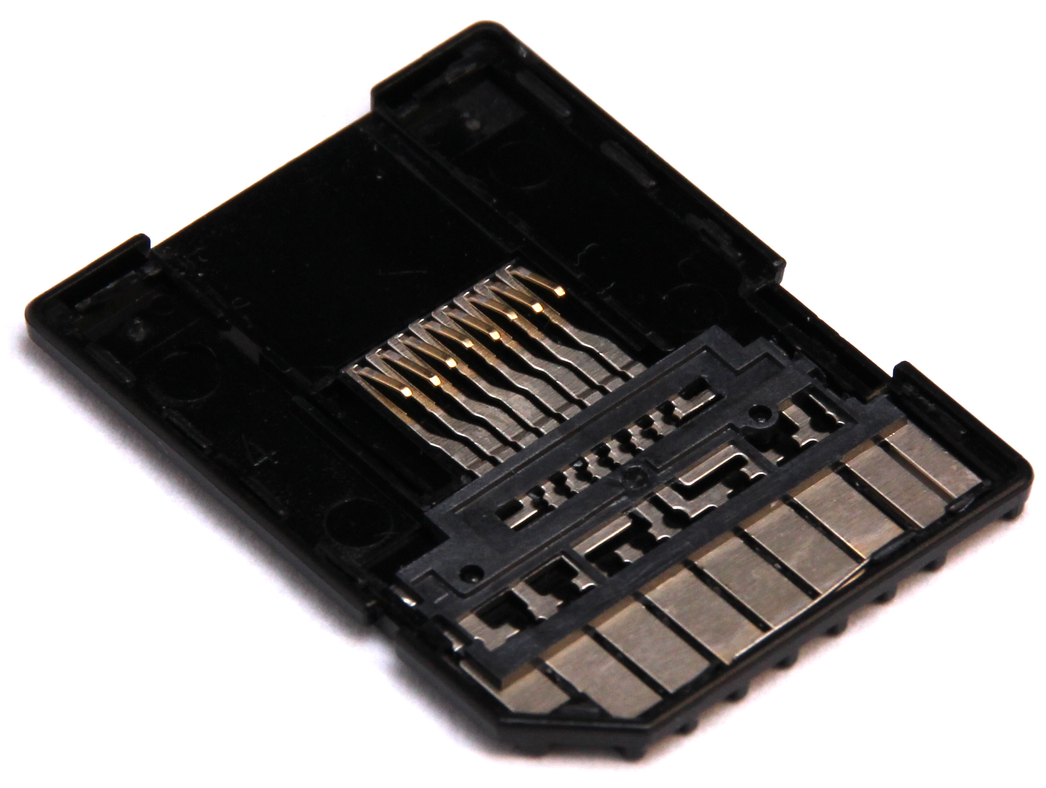 Ein geöffneter Adapter zum Adapterien von MicroSD auf SD. Der Schreibschutz-Schalter wurde entfernt.